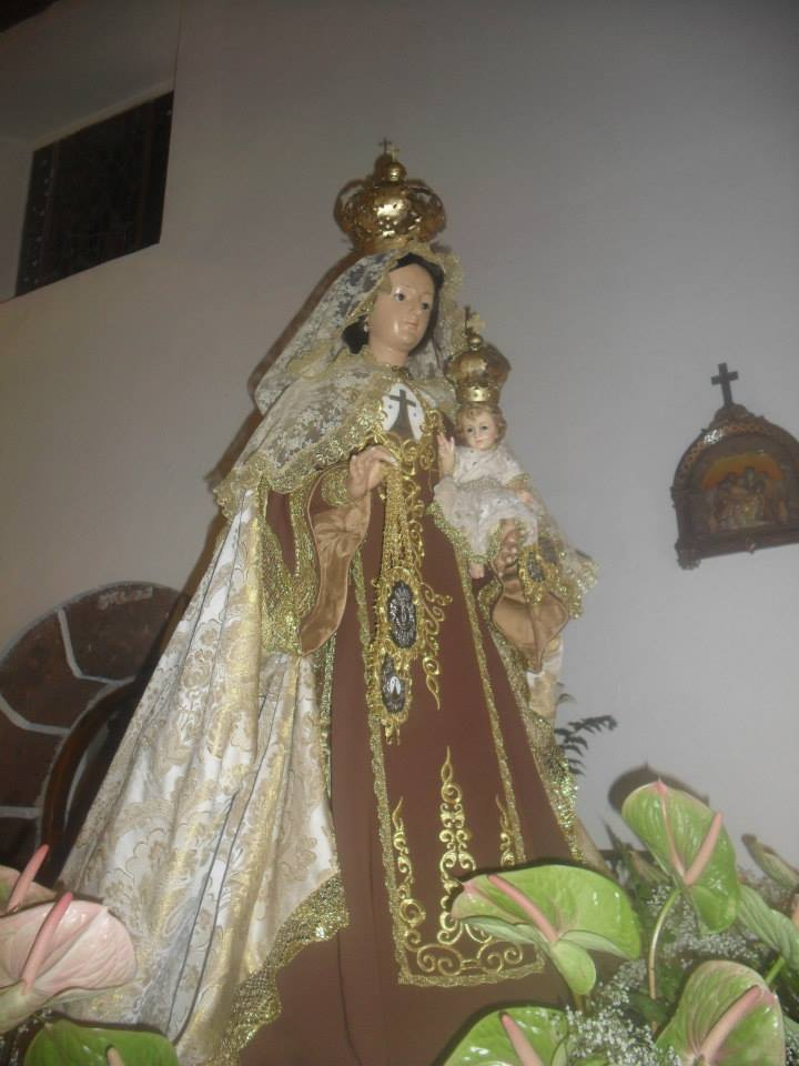 Imagen de Nuestra Señora la Virgen del Carmen, compatrona del pueblo de San Andrés en la isla de Tenerife.